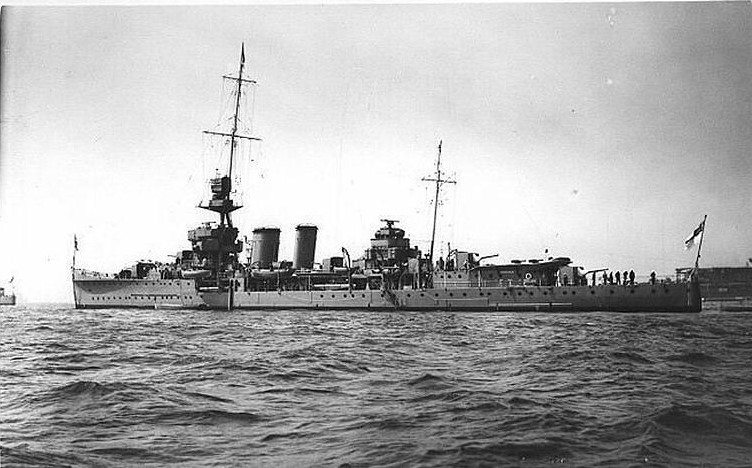 Der britische Kreuzer Carlisle nach Fertigstellung